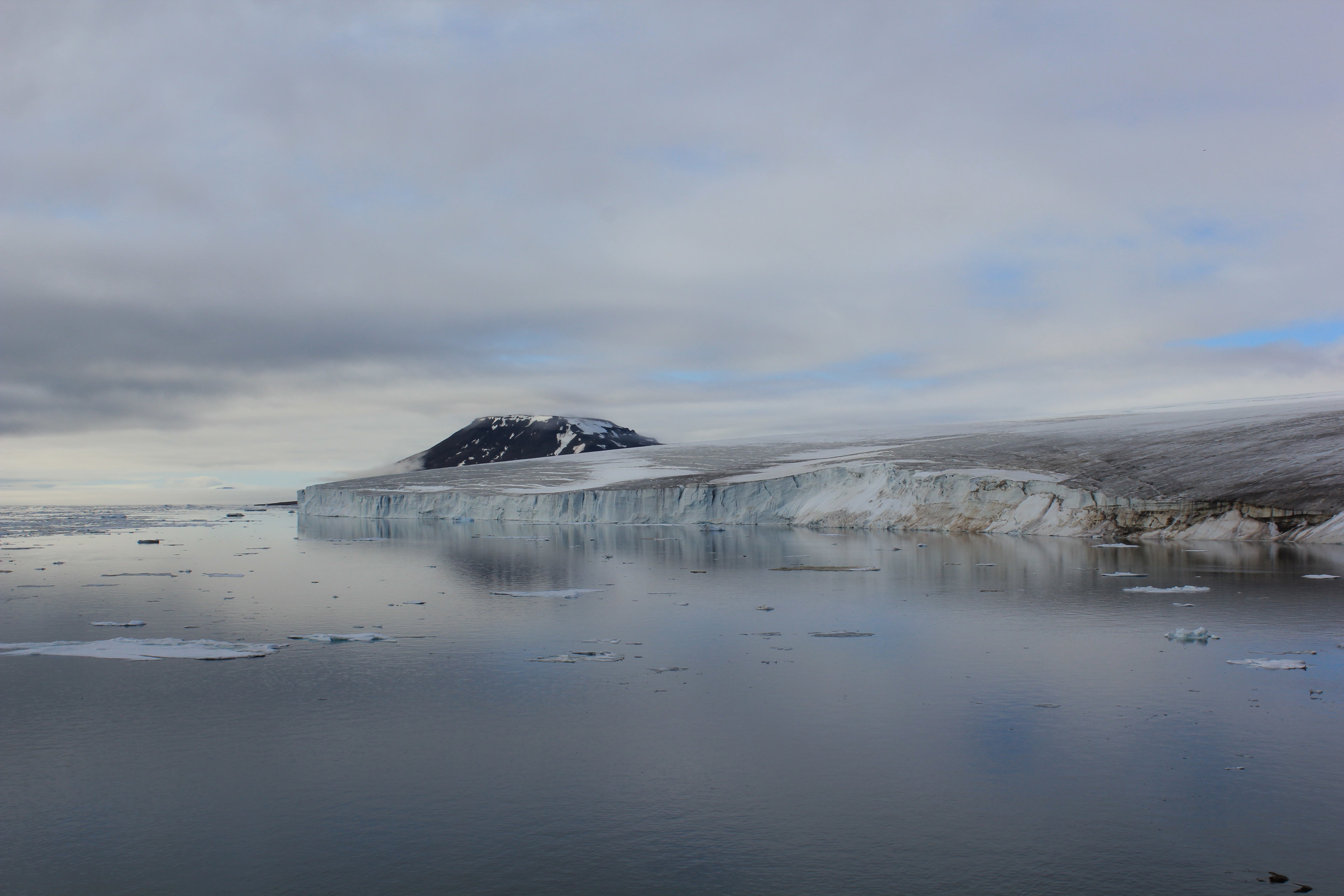 Комплексный заказник Земля Франца-Иосифа: Архангельск,Приморский район, Архангельская область This image is related to the protected area of Russia number 2930163